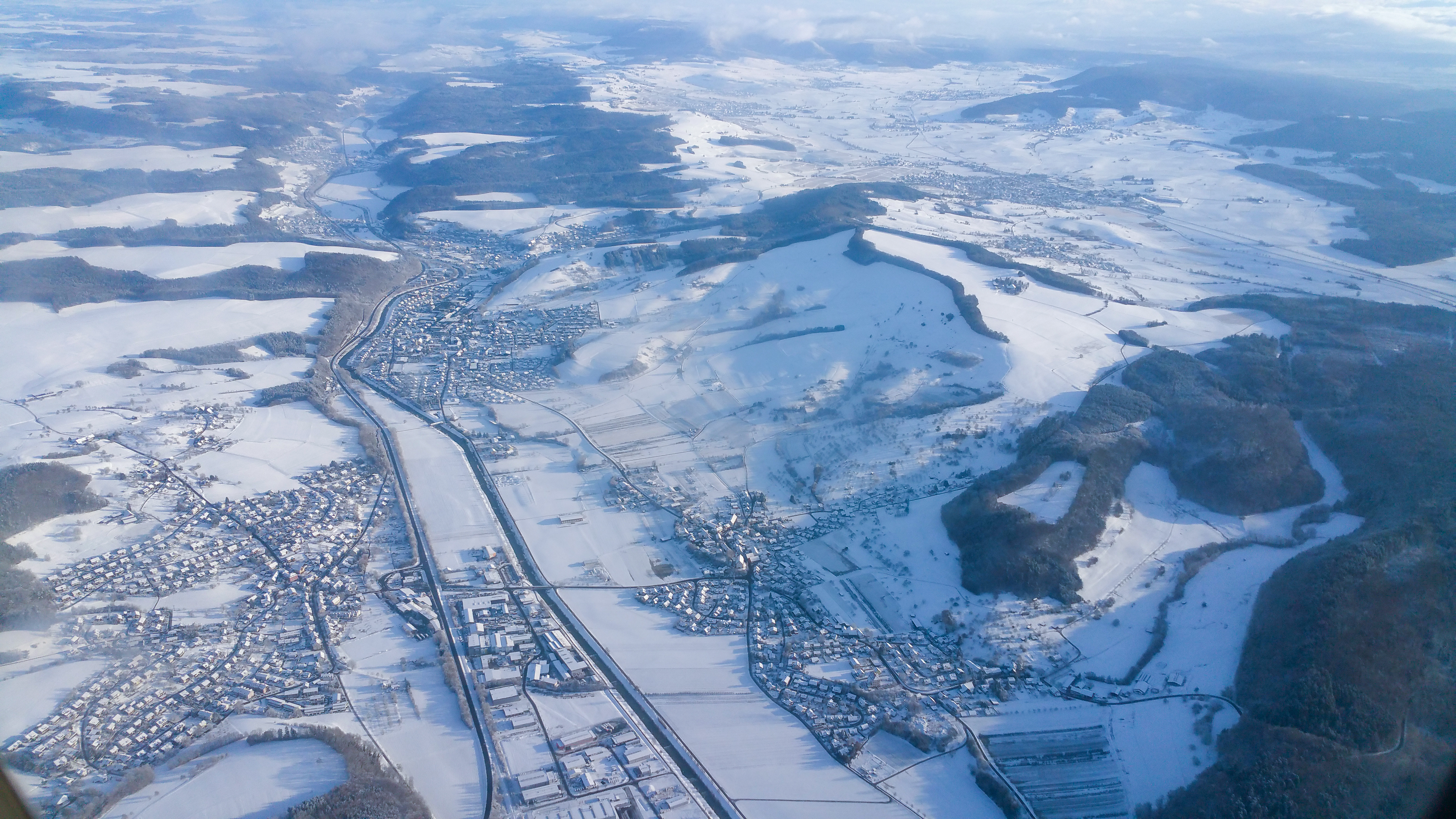 Germany, Baden-Württemberg, approach into ZRH across the Southern part of Black Forest. Achtung: Entgegen der Bildbenennung handelt es sich hier um Wutöschingen (Mitte), Horheim (unten links) und Schwerzen (unten rechts).